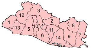 Map of the departments of El Salvador numbered in English alphabetical order. Ahuachapán Cabañas Chalatenango Cuscatlán La Libertad La Paz La Unión Morazán San Miguel San Salvador San Vicente Santa Ana Sonsonate Usulután